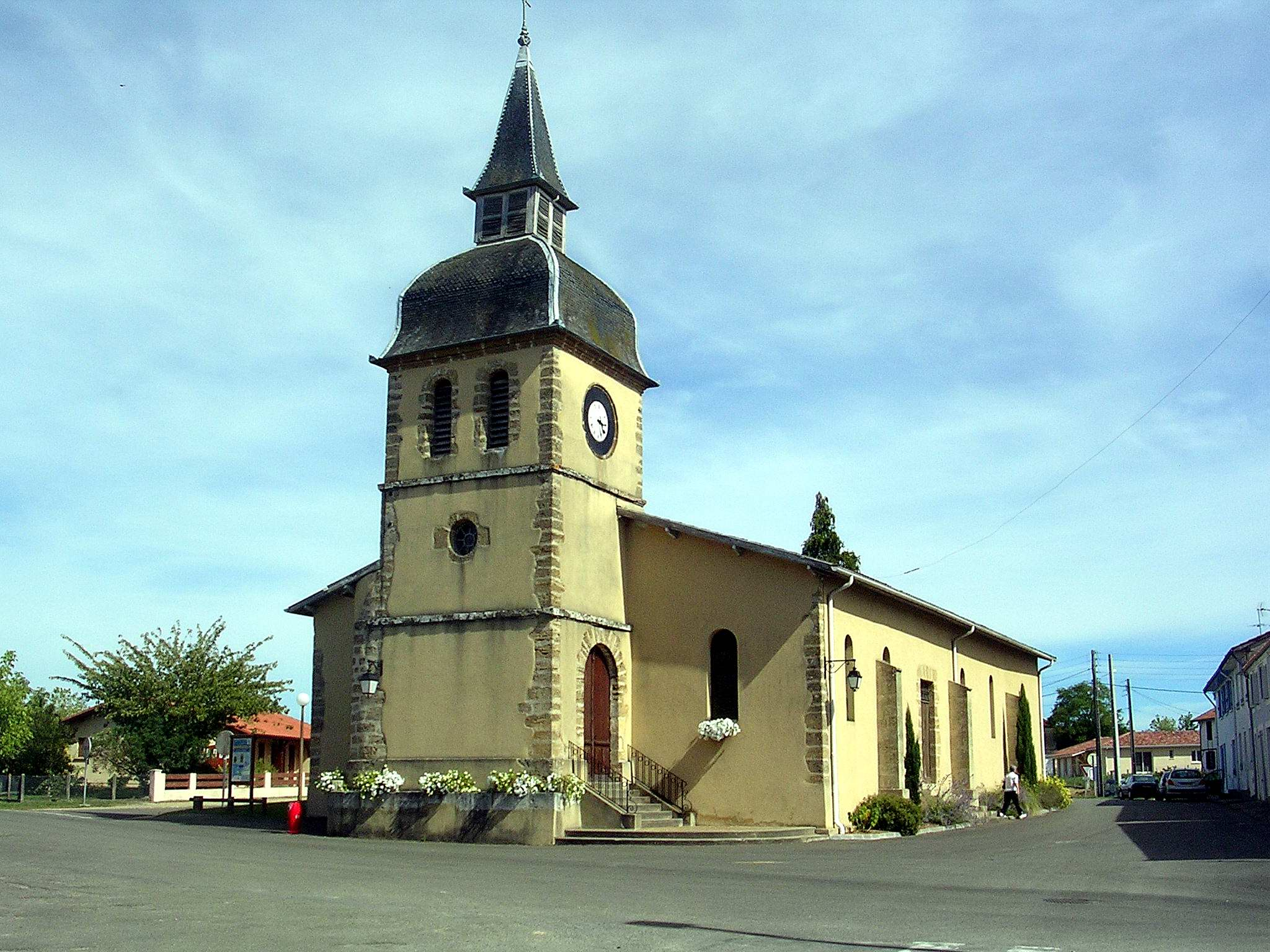 Eglise de Meilhan, dans le département français des Landes